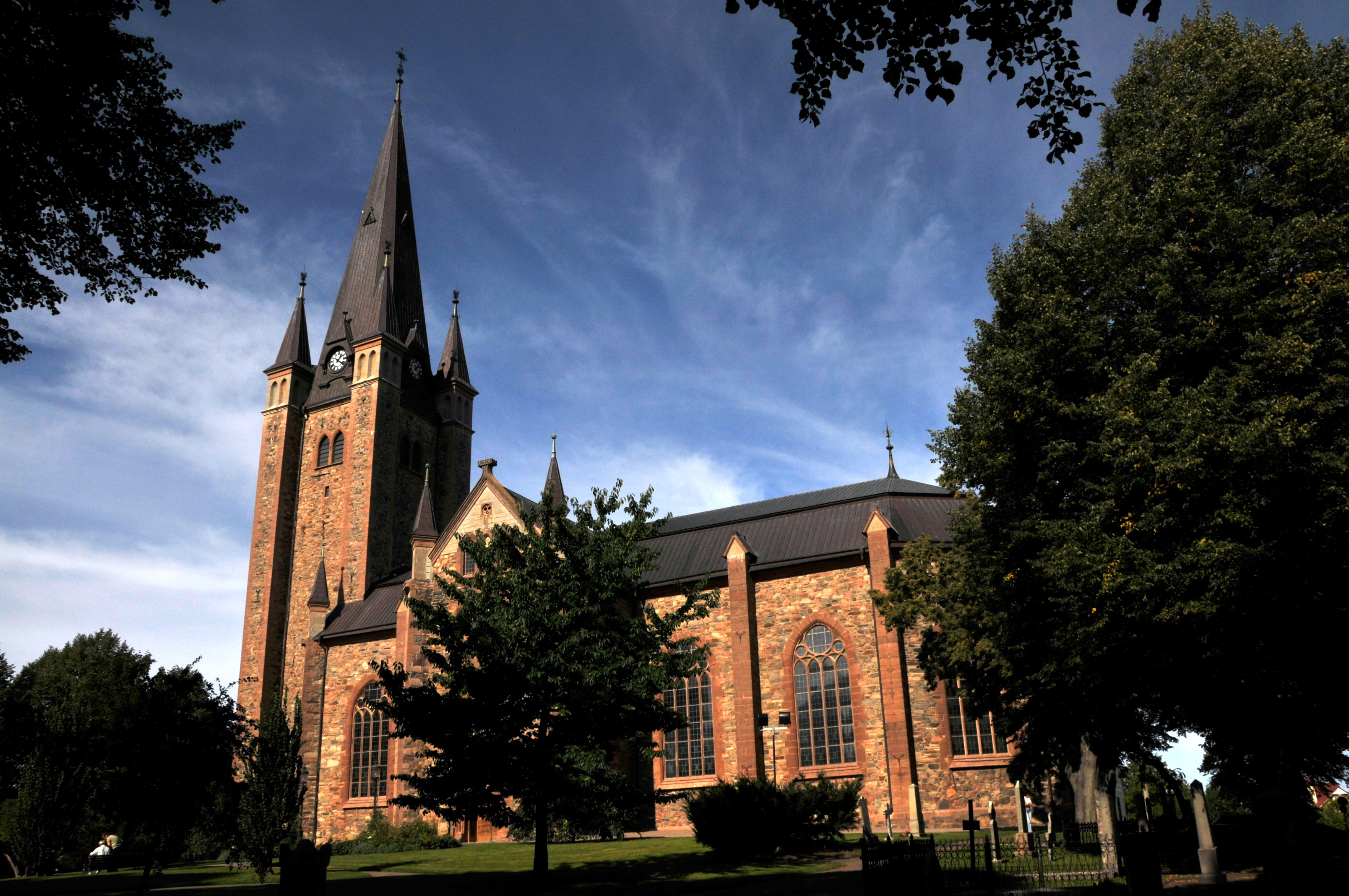 Dom zu Mariestad Südseite